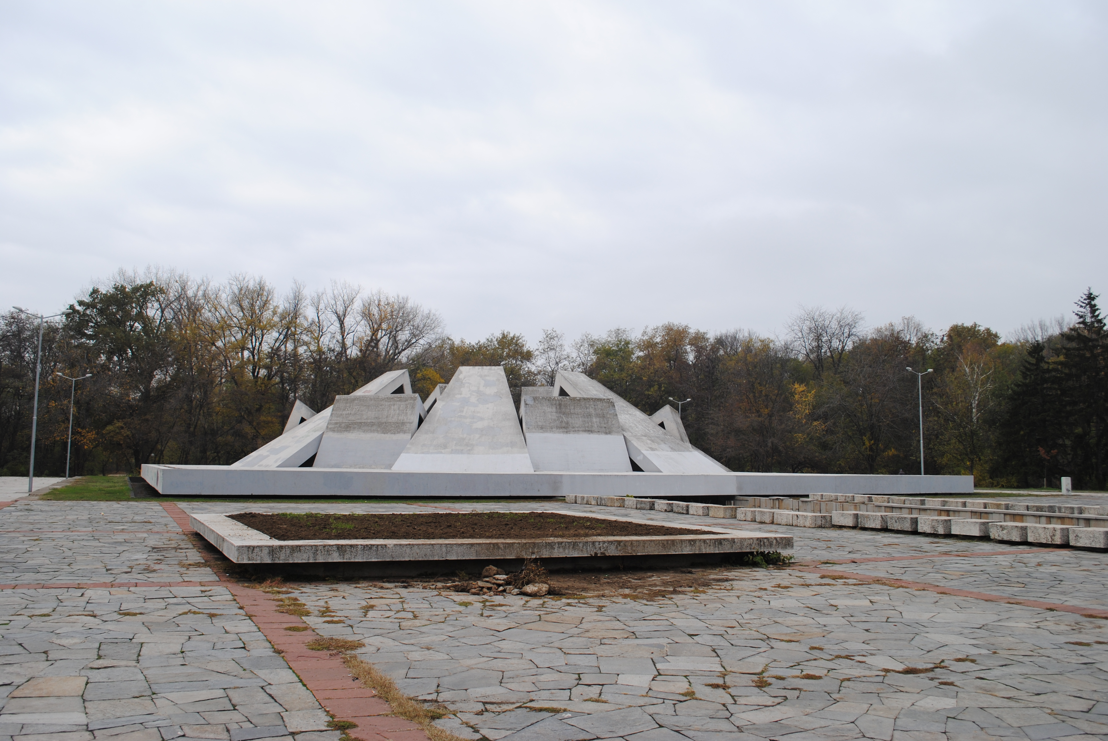 Братската могила в Пловдив